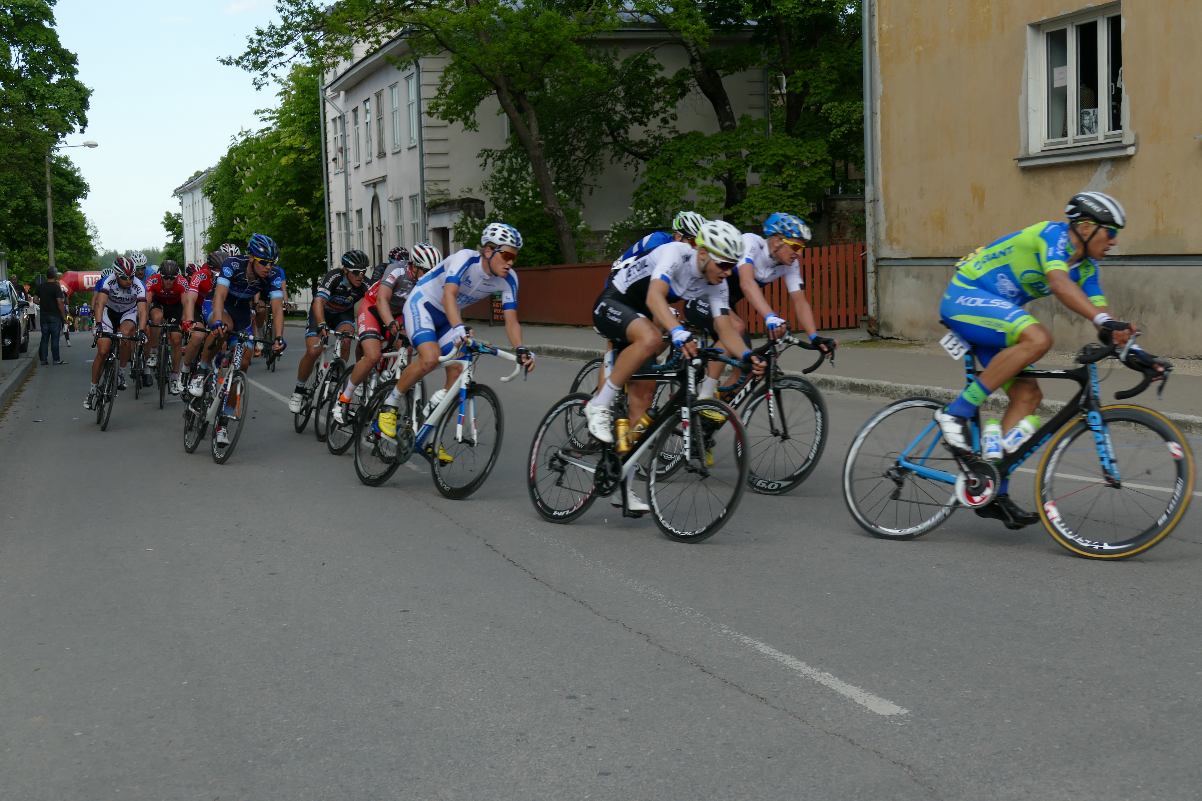 Tour of Estonia Tartu Grand Prix 2. etapp Tartu tänavatel 30.05.2015. Grupisõit 150km.